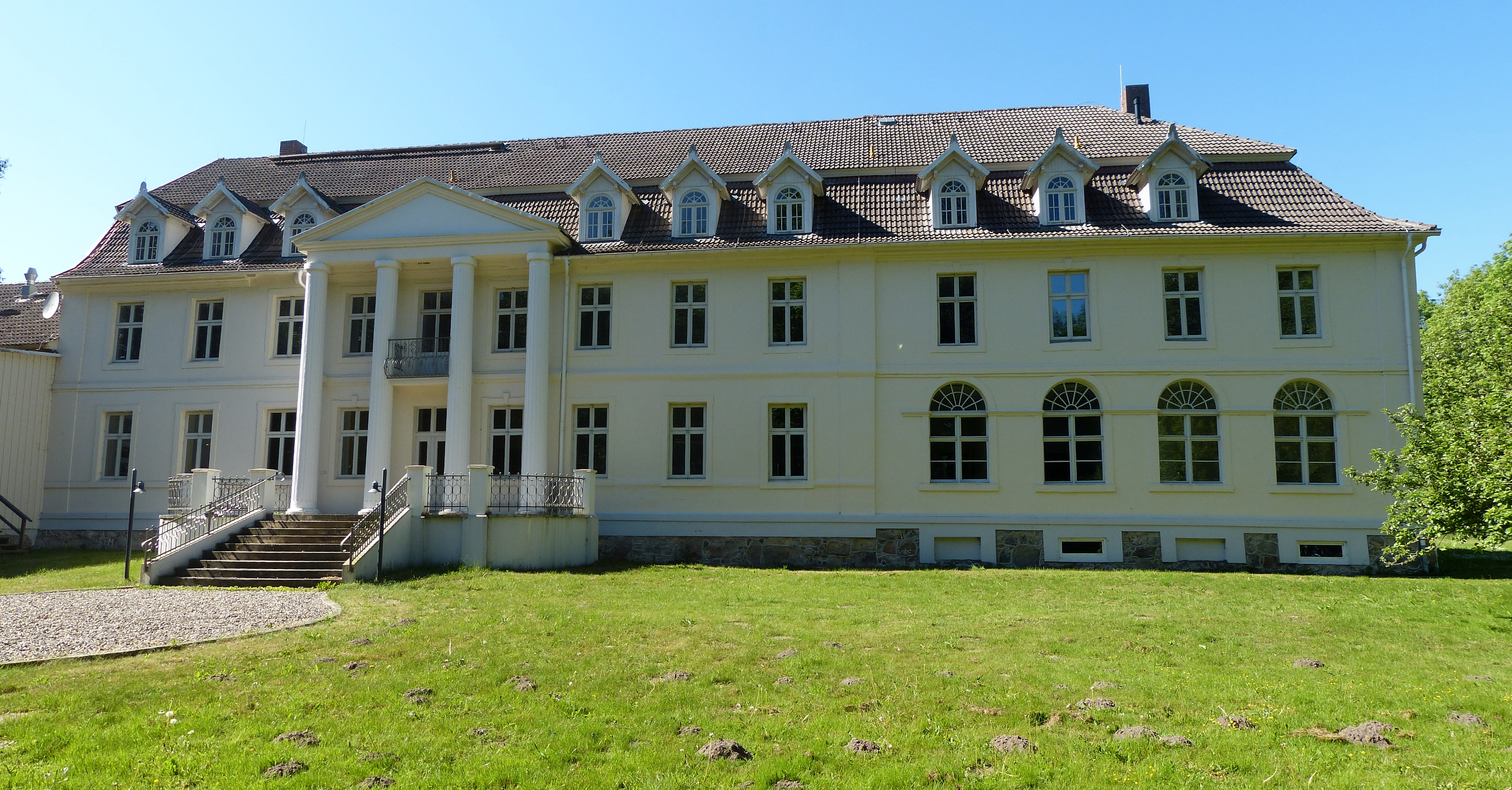 Herrenhaus Buggenhagen, Parkseite, Ansicht von Südosten